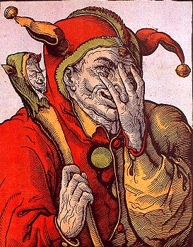 Der Schalksnarr, Narr mit Marotte, Kolorierter Holzschnitt von Heinrich Vogtherr dem Jüngeren, um 1540